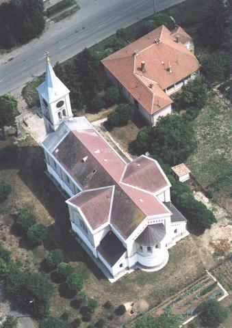 Fegyvernek, Hungary, aerialphotography. Szent Vendel római katolikus templom